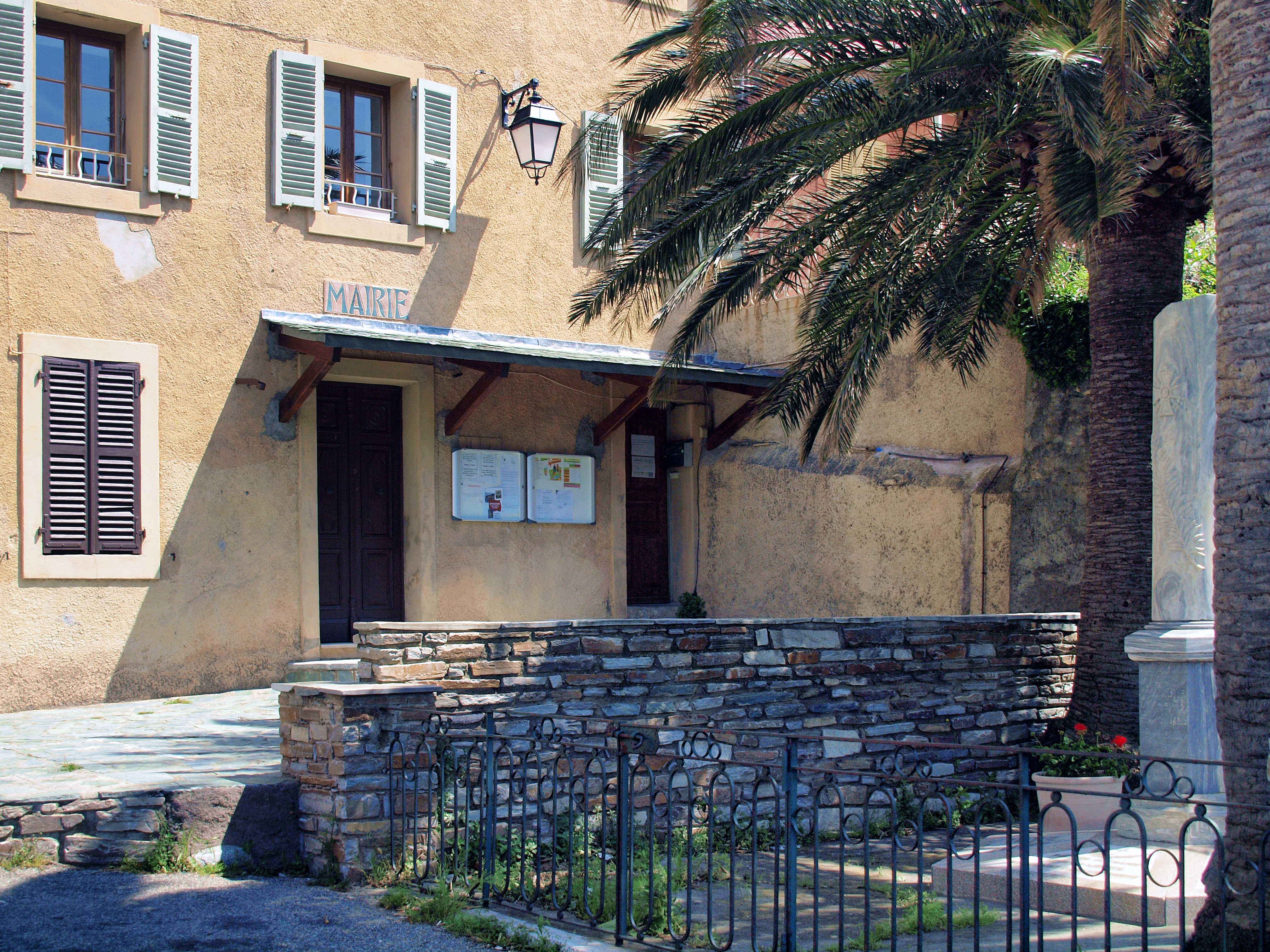 Santa-Maria-di-Lota, Cap Corse (Corse) - Mairie annexe et école, et monument aux morts à Figarella